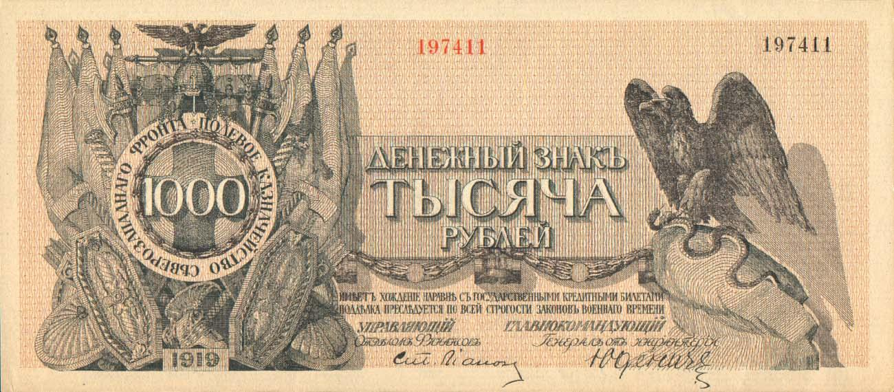 1000 рублей. Кредитный билет полевого казначейства Северо-западного фронта. Подпись Юденича. Аверс judenich signed north western,s army note